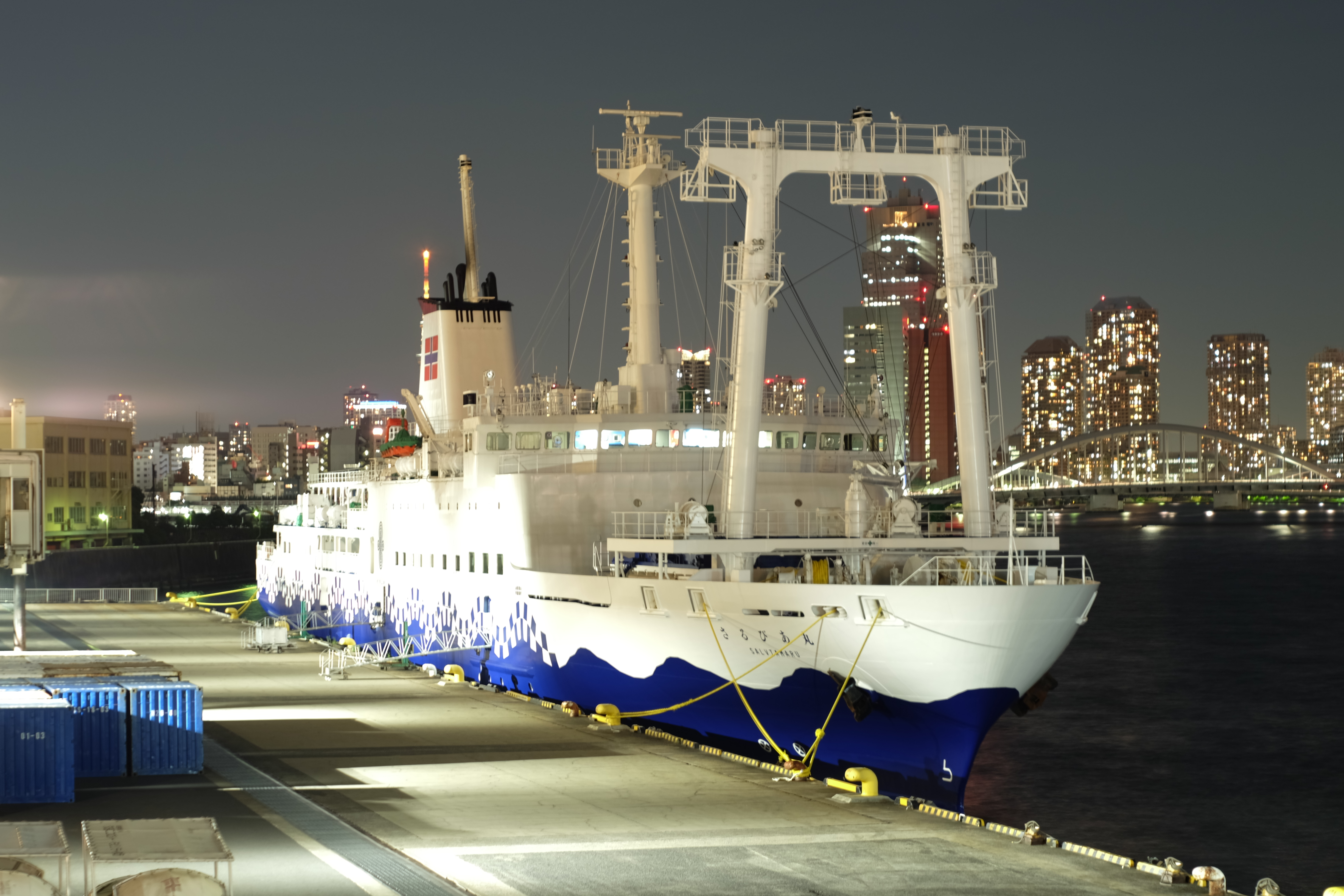 さるびあ丸（3代・東海汽船、東京港竹芝桟橋より撮影）Fujifilm X-M1